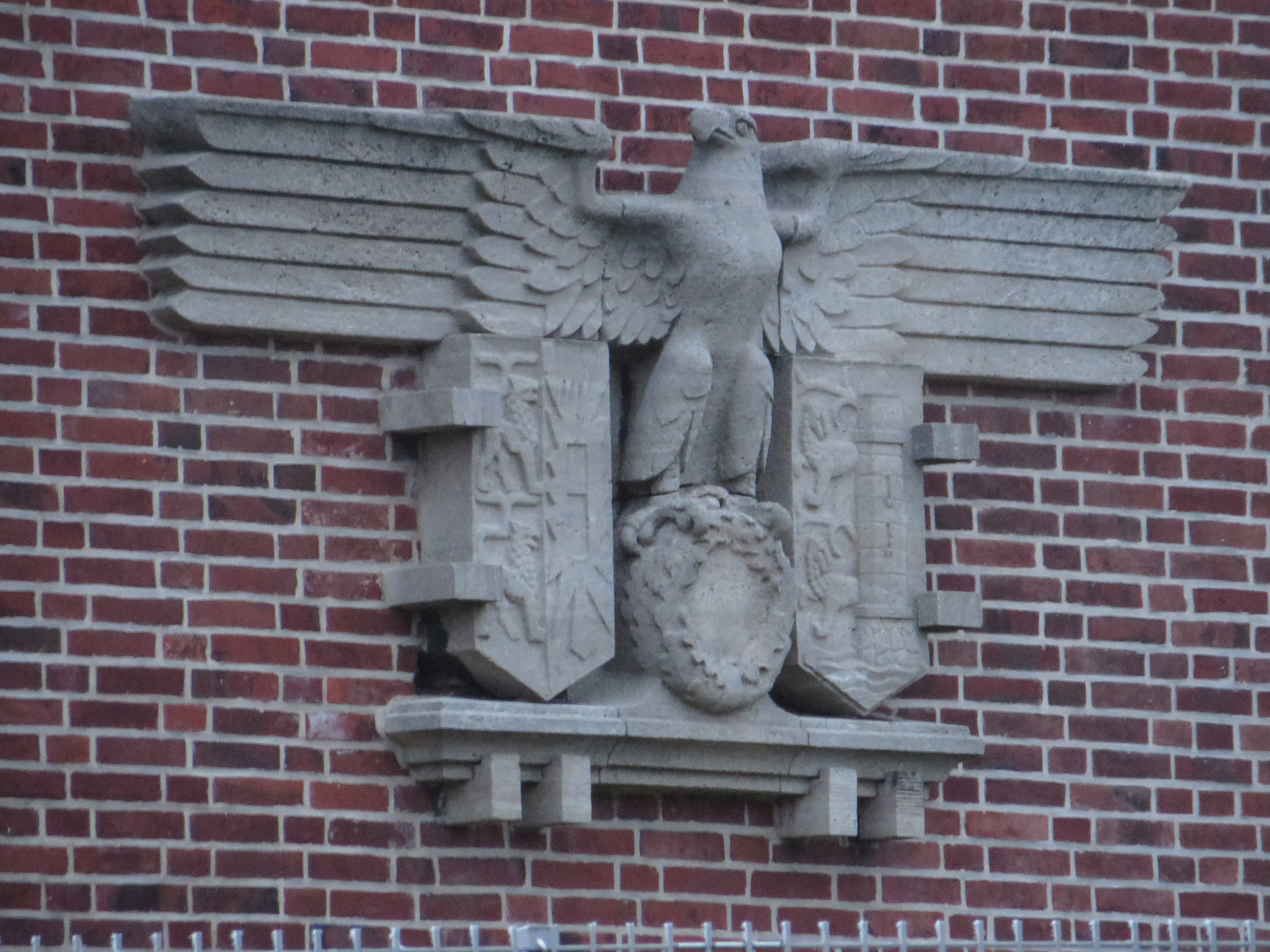 An der Marinesportschule, Reichsadler (Mürwik Januar 2015), Bild 02; Hakenkreuz wurde entfernt.